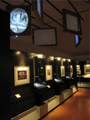 Interno del Museo di Storia della Fotografia Alinari di Firenze